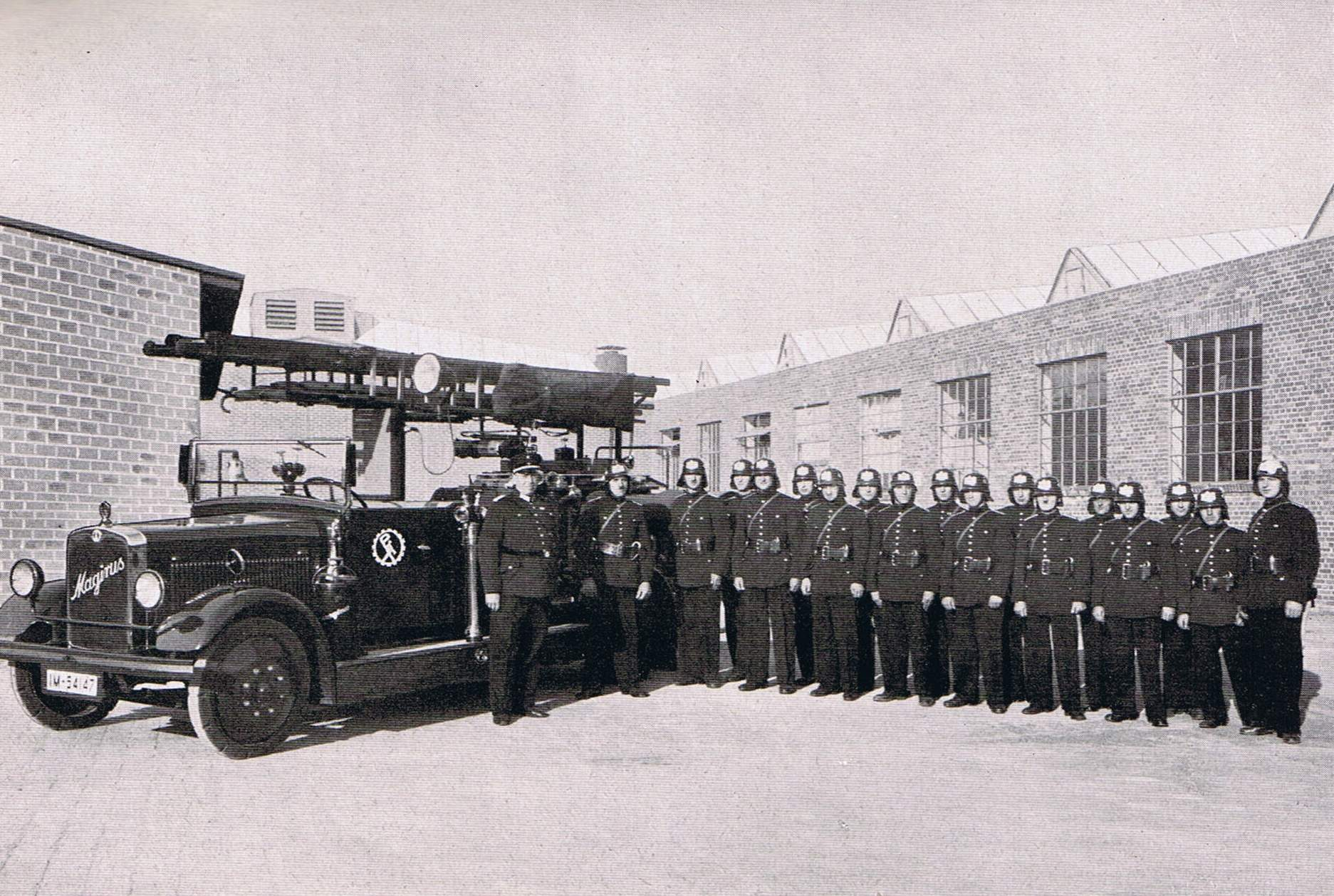 Polte-Werke, Magdeburg, Werksfeuerwehr